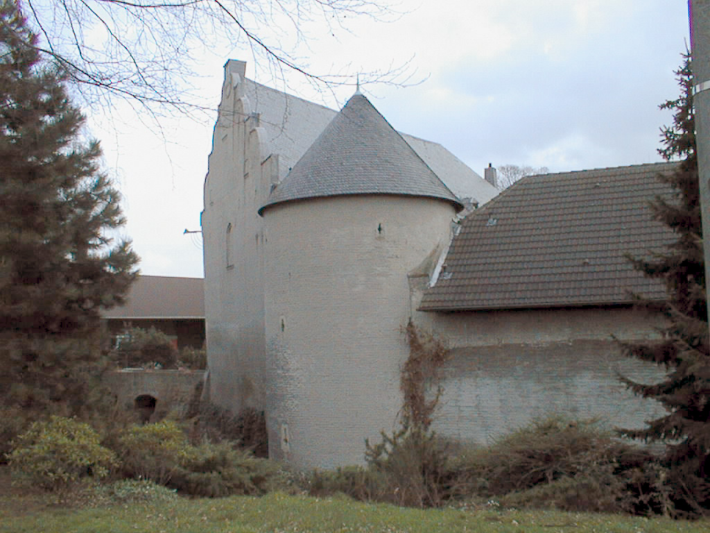 Junkerburg Pulheim-Geyen